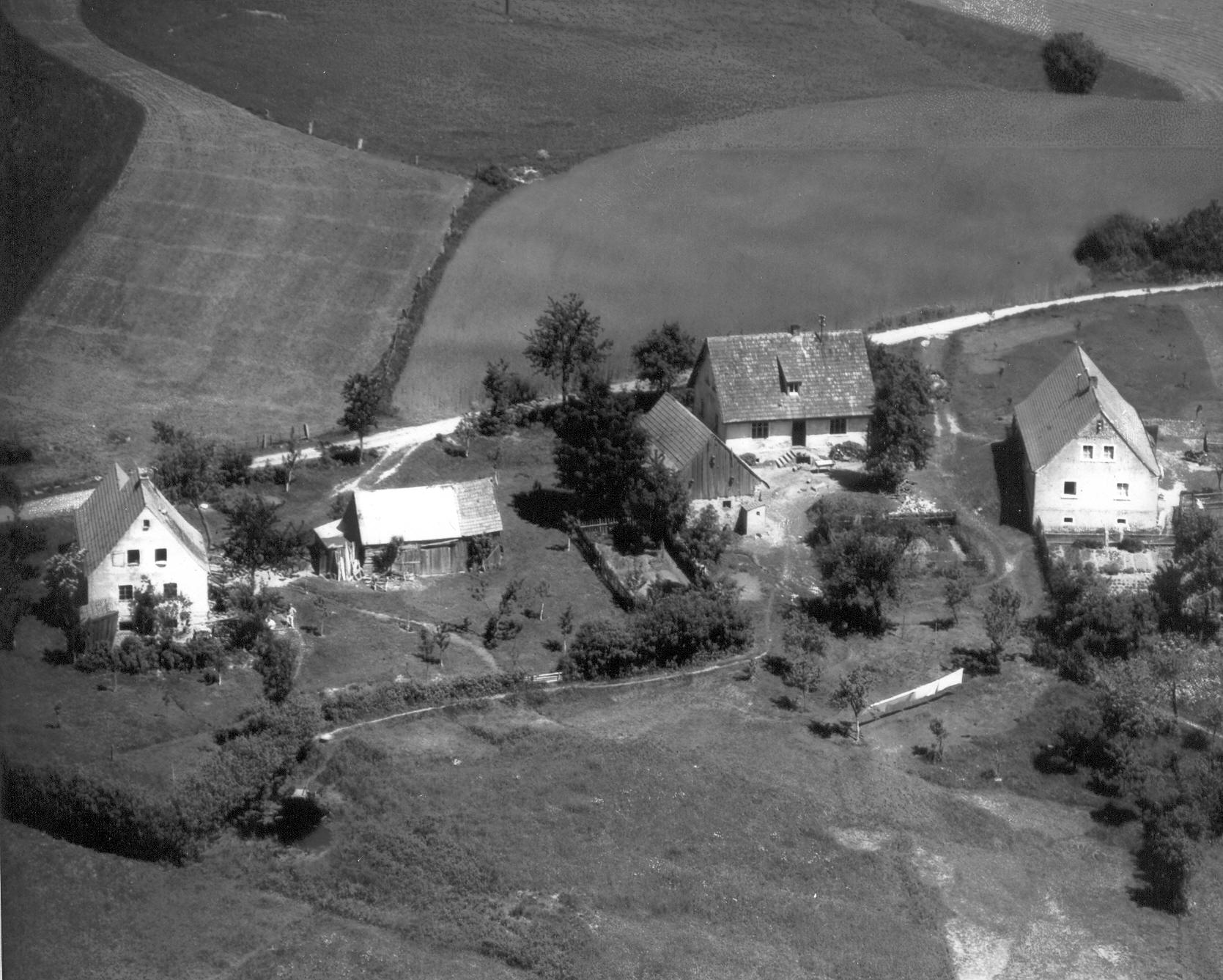 Zieglhäuser, Gemeinde Gleritsch im Jahre 1960